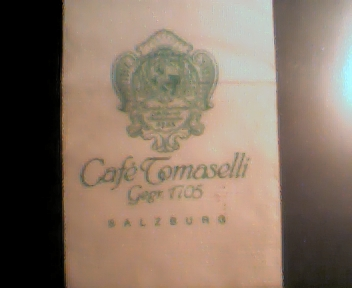 serviette from Café Tomaselli